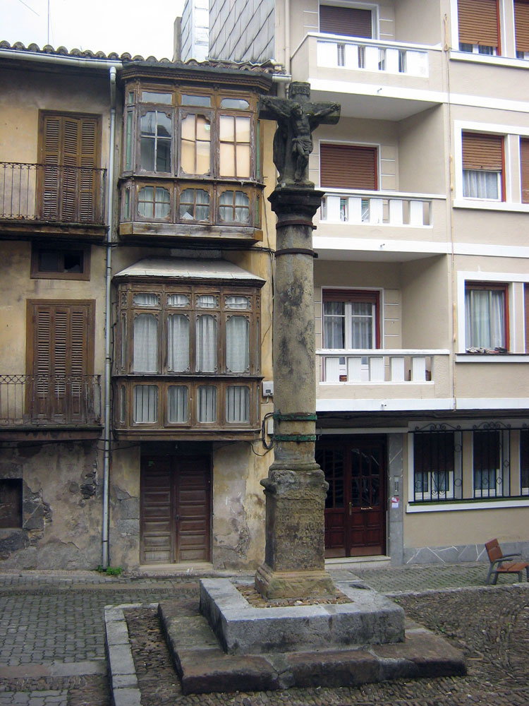 Cruz de Kurtzio, perteneciente a la localidad vizcaína de Mundaca.